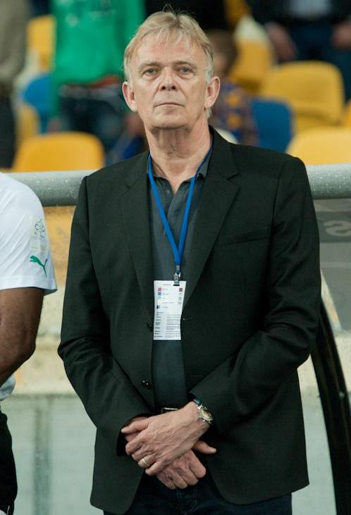 Фолькер Фінке — німецький футбольний тренер